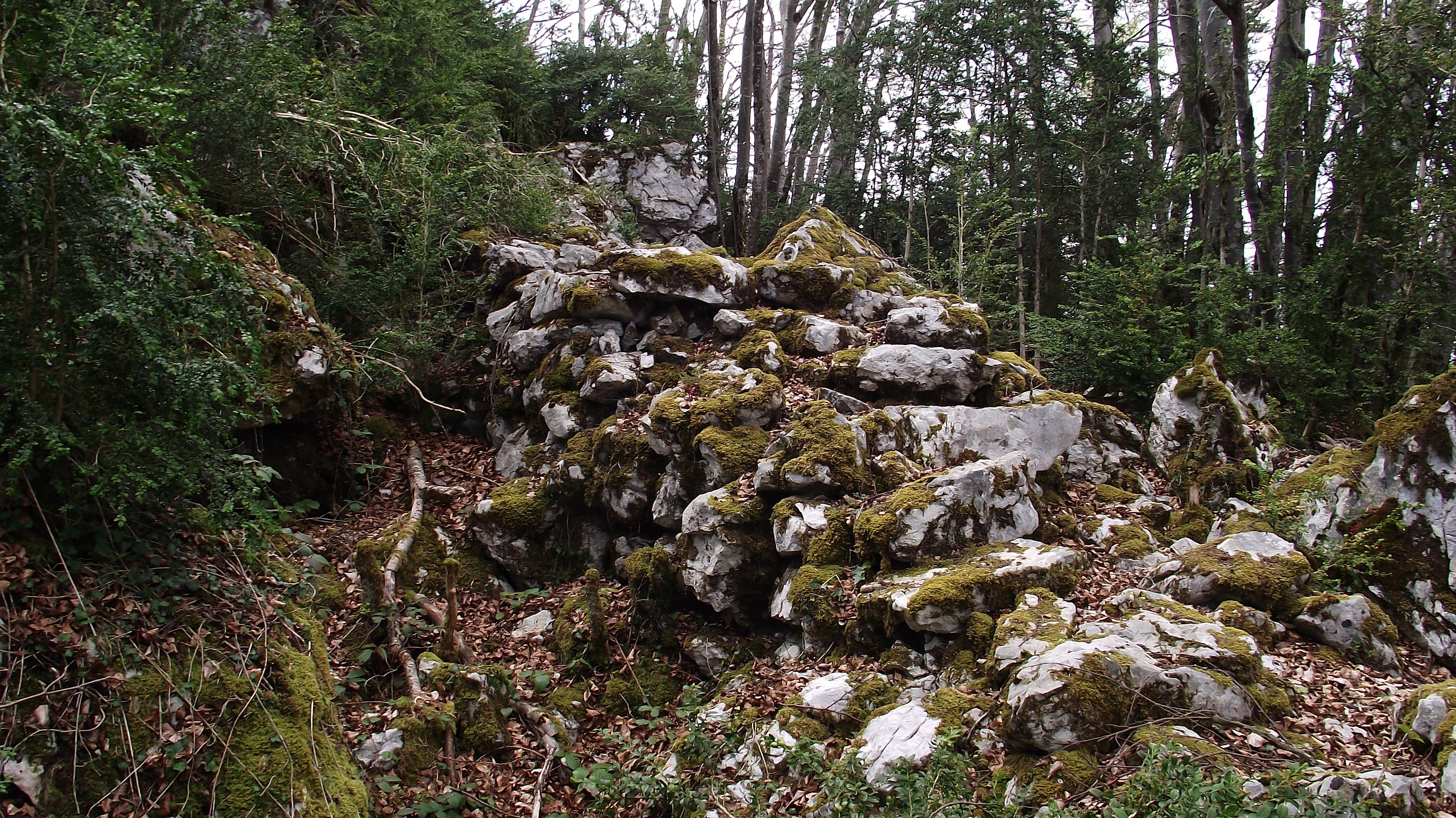 Aven des Escaliers, Montsegur.